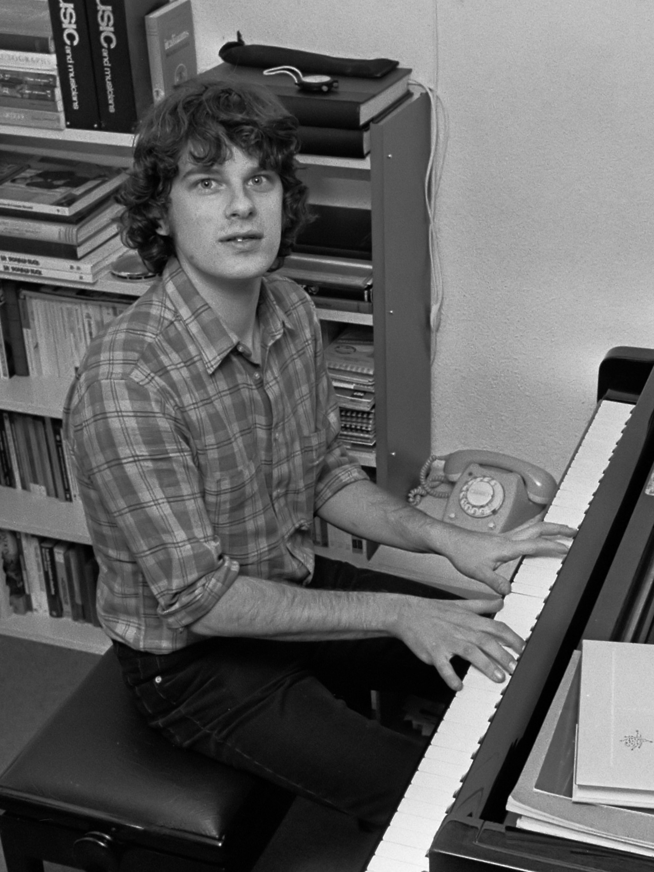 De pianist R. Brautigam 4 december 1981